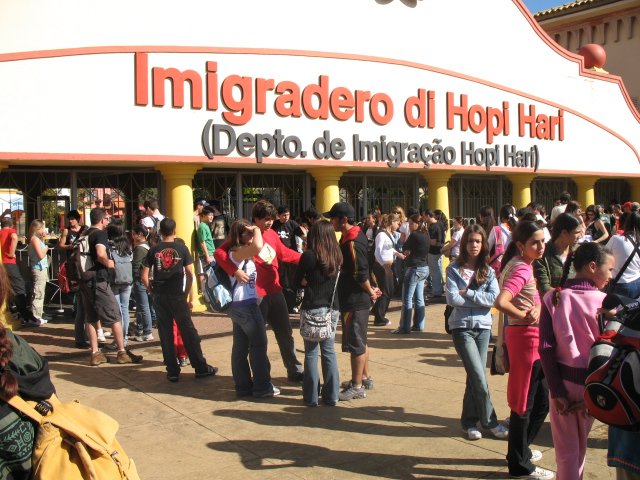 Entrada do parque temático Hopi Hari em Vinhedo, São Paulo, Brasil.